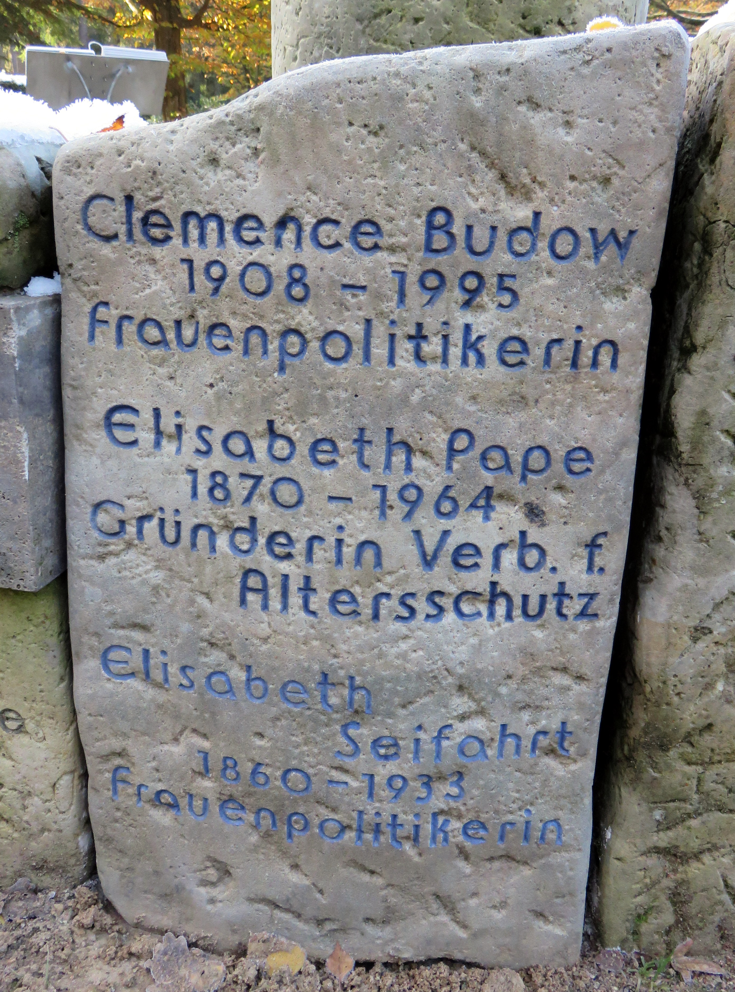 Gedenkstein für die deutsche Rundfunkpionierin und Politikerin Clémence Budow, die deutsche Pädagogin und Politikerin Elisabeth Pape sowie (nachträglich) die Hamburger Politikerin und Abgeordnete der Hamburger Bürgerschaft Elisabeth Seifart in der Erinnerungsspirale im Bereich des Gartens der Frauen auf dem Ohlsdorfer Friedhof in Hamburg-Ohlsdorf.